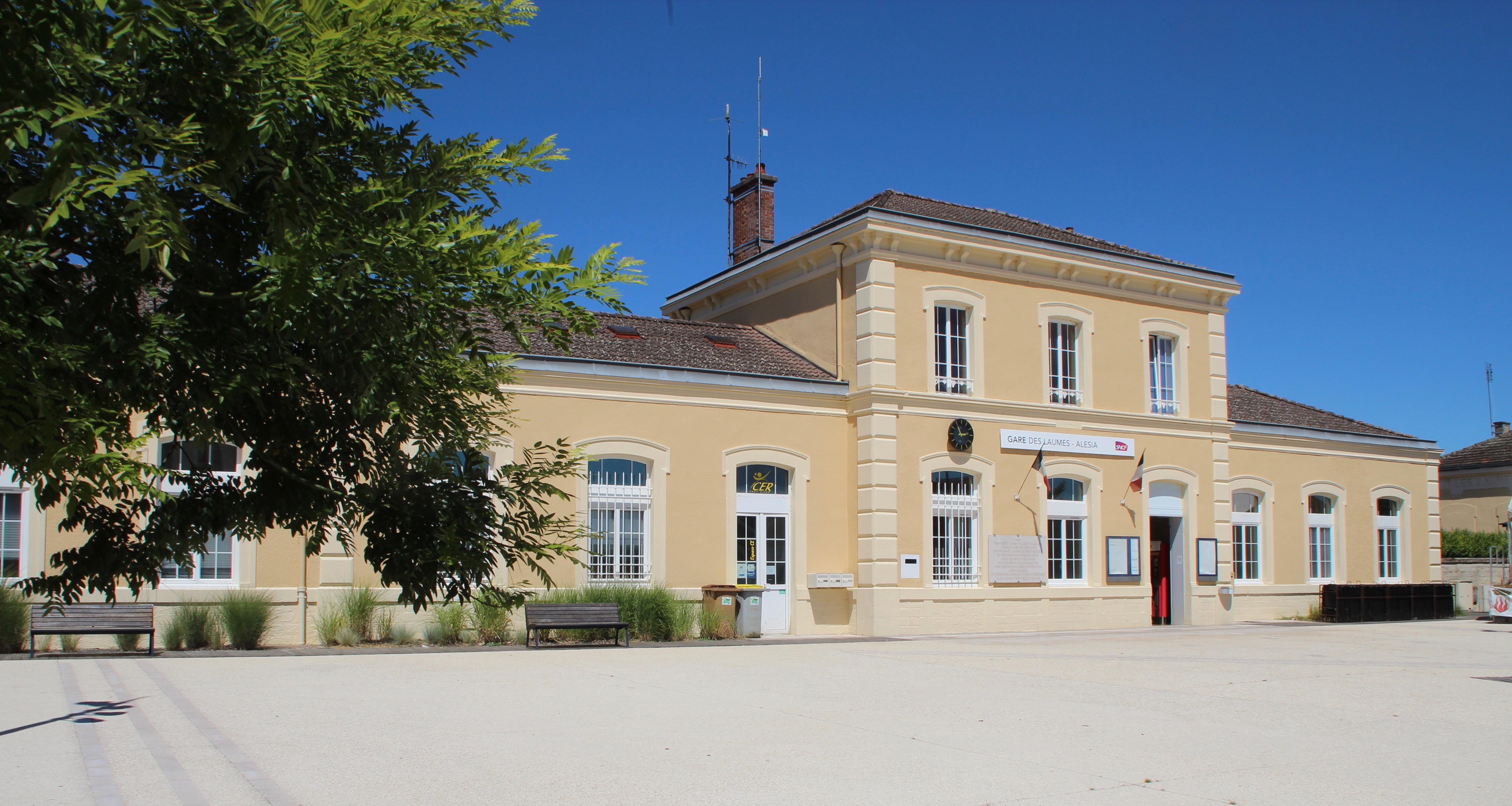 Gare des Laumes-Alesia